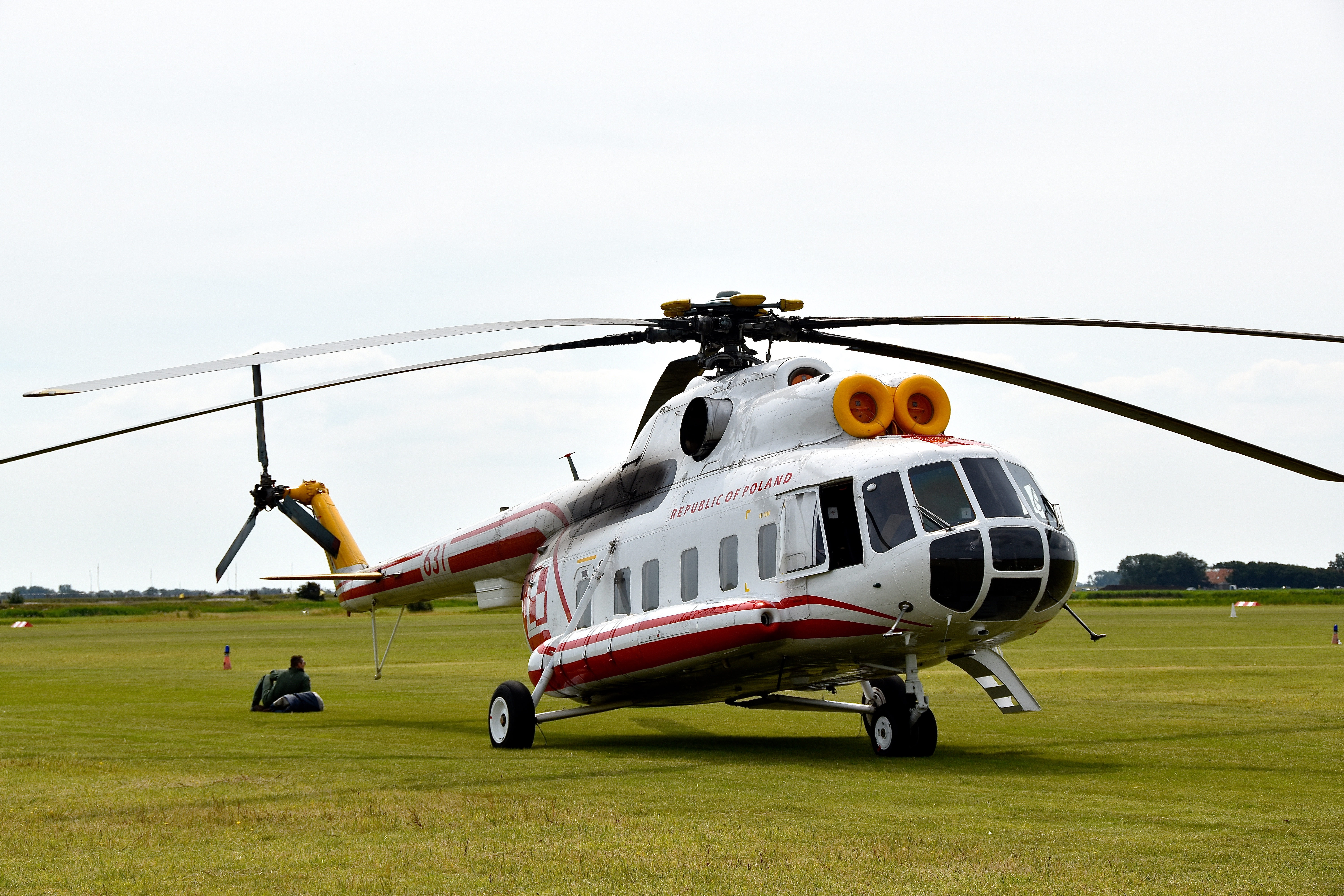 Texel Air Show 2015 De Mil Mi-8 (Russisch: Ми-8) (NAVO-codenaam: Hip) is een grote twin-turbine transporthelikopter, die ook ingezet kan worden als gevechtshelikopter. Het eerste prototype, met één Al-24W motor, vloog in juli 1961. De tweede, met twee Al-24W motoren, vloog voor het eerst in september 1962. Na enkele wijzigingen werd in 1967 in dienst genomen bij de Sovjetluchtmacht als Mi-8. De machine op de foto is van de Poolse luchtmacht. Bron